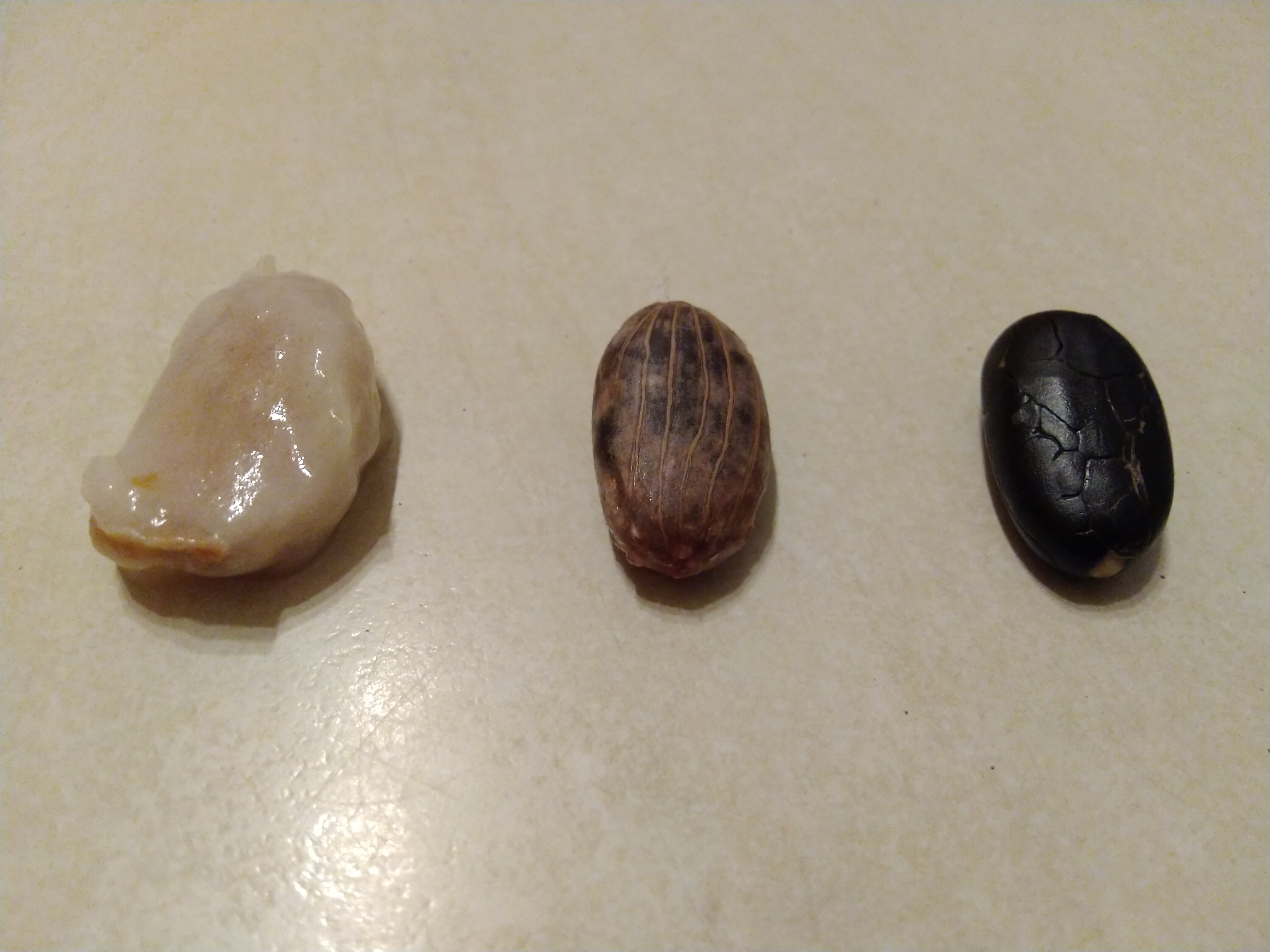 Kakaové boby: s dužinou, bez dužiny, bez dužiny a šlupky.